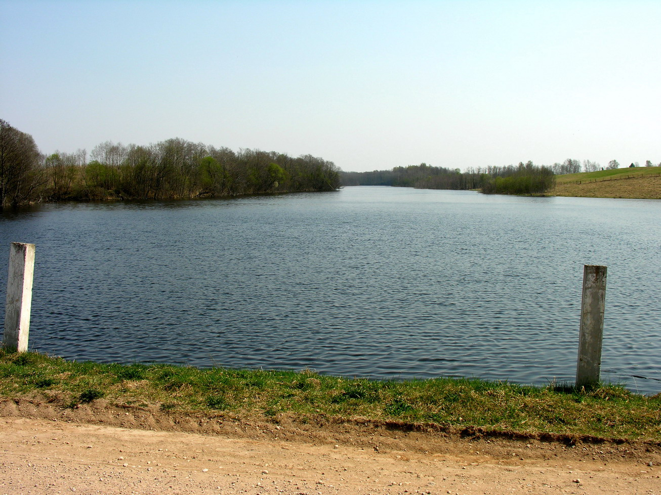 Ašvos upės tvenkinys, Mažeikių raj., Reivyčių sen. Fotografavo: Algirdas, 2006 m. gegužės 4 d.